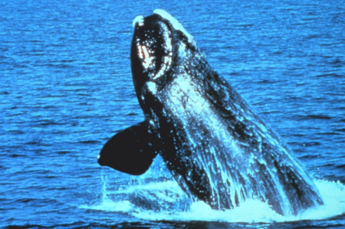 Nordkaper (Eubalaena glacialis)